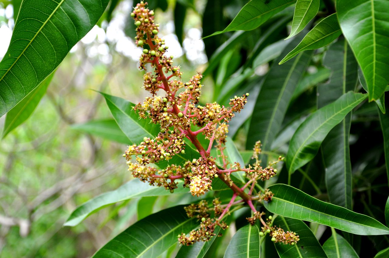 Grappe de fleurs de manguier.